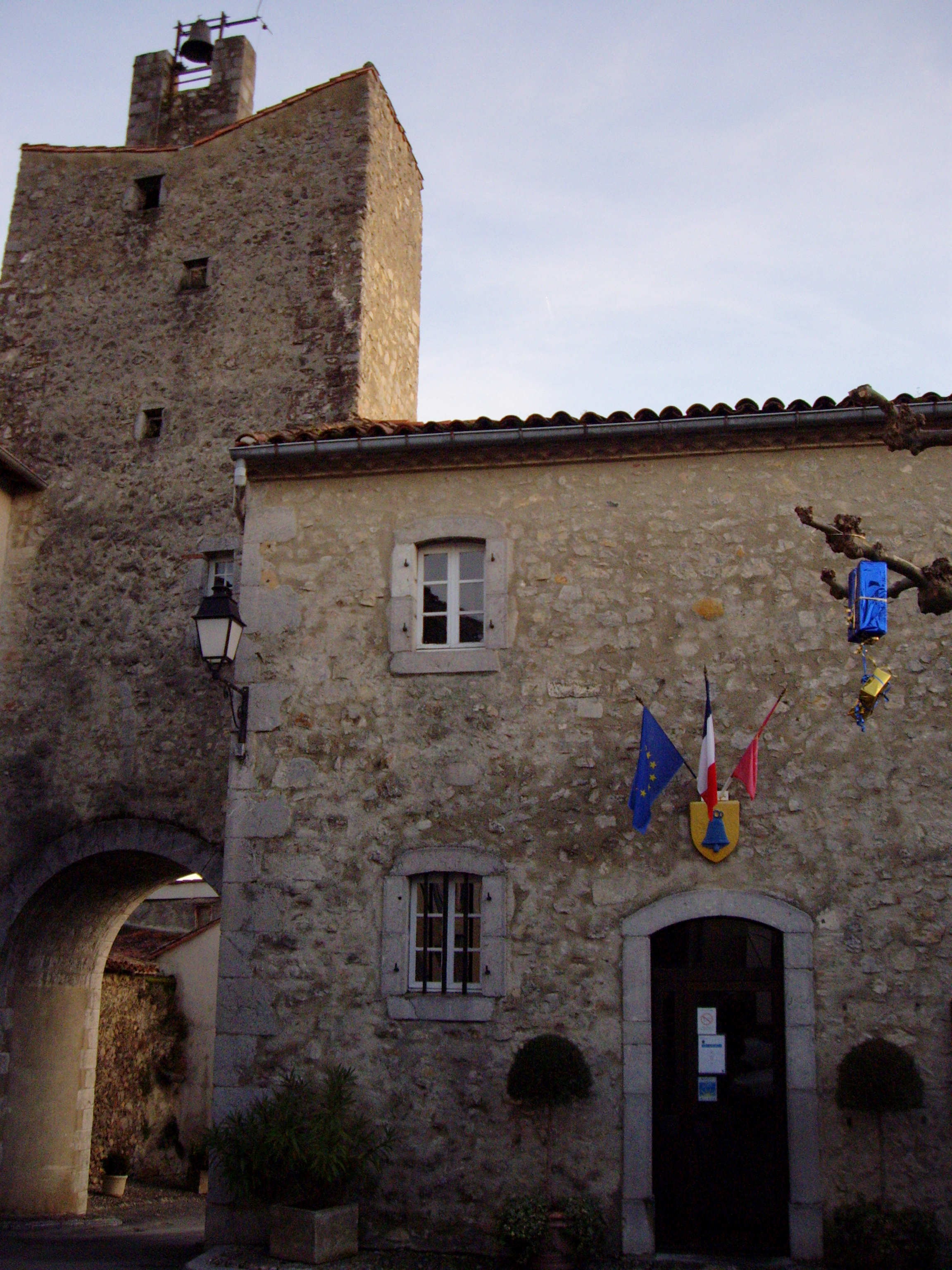 Mairie de Saint-Lizier (Ariège, France).